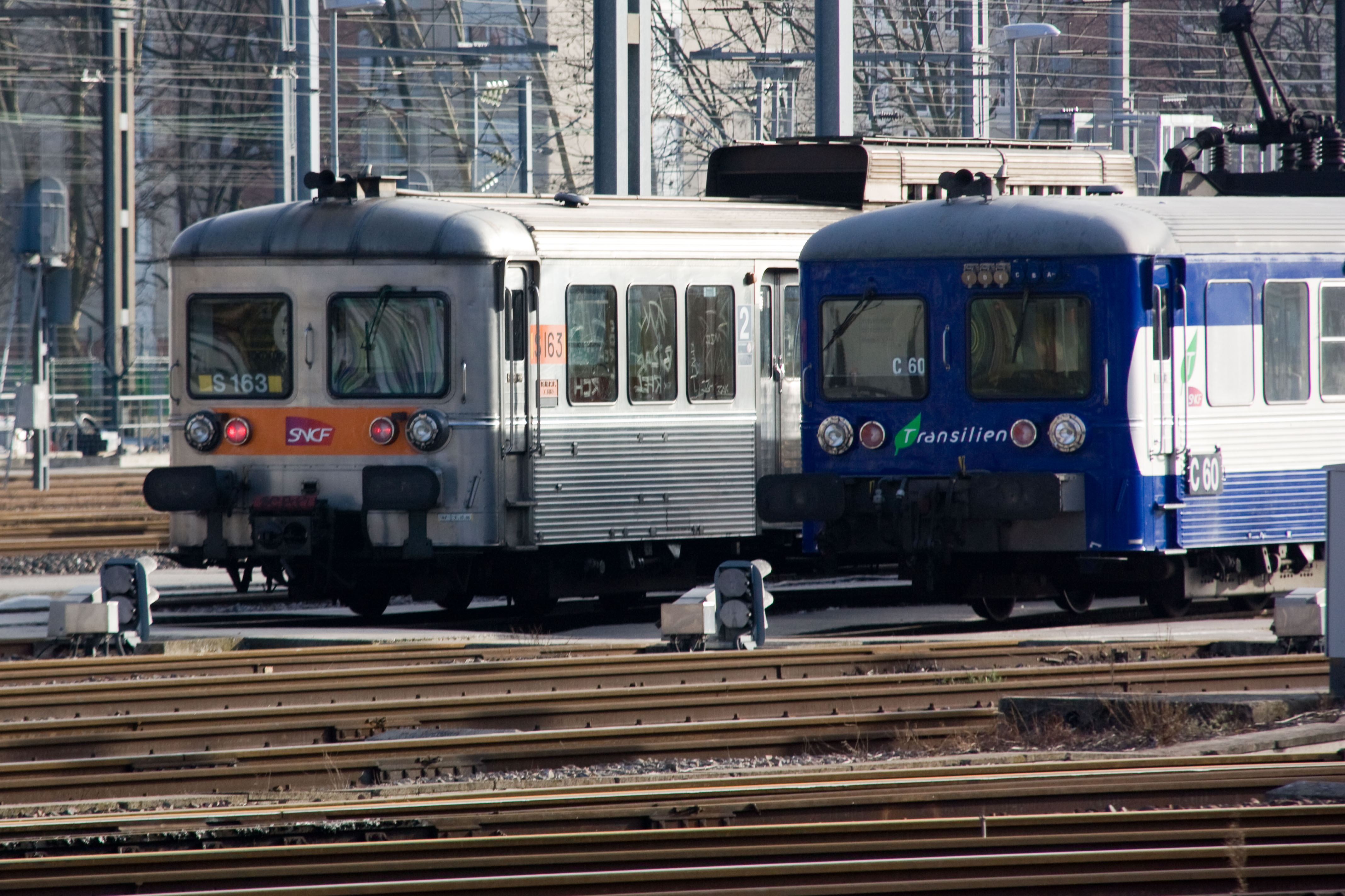 Journée Porte Ouverte du 20 mars 2010 au technicentre Paris Nord-Joncherolles, Villetaneuse, Seine-St-Denis, France